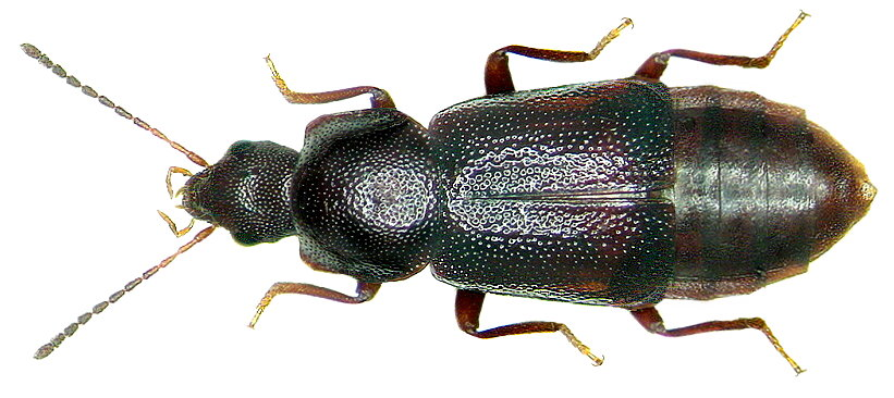 Familie: Staphylinidae Groesse: 4,5-5 mm Verbreitung: Europa Fundort: Tschechei, Isergebiet, Jizerka leg.det. A.Skale, 1998 Photo: U.Schmidt, 2006